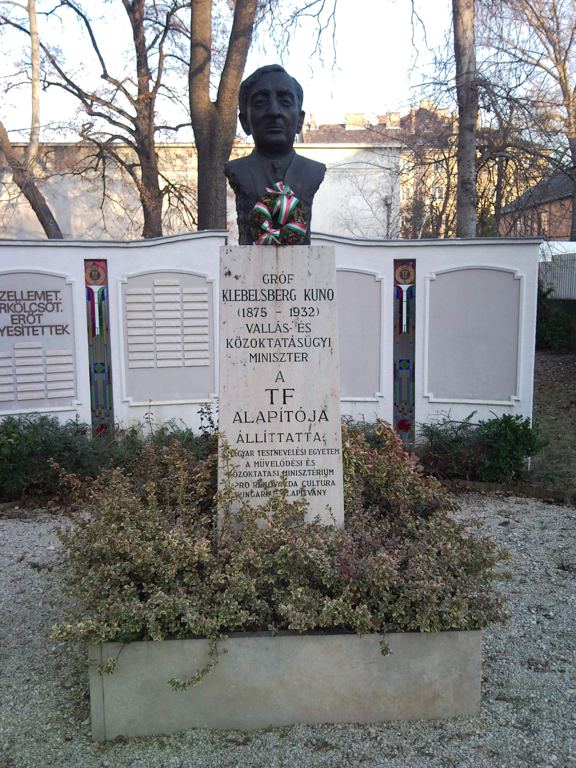 Klebelsberg Kunó szobra a Testnevelési Egyetem parkjában. Mihály Gábor szobrászművész alkotása (1994)